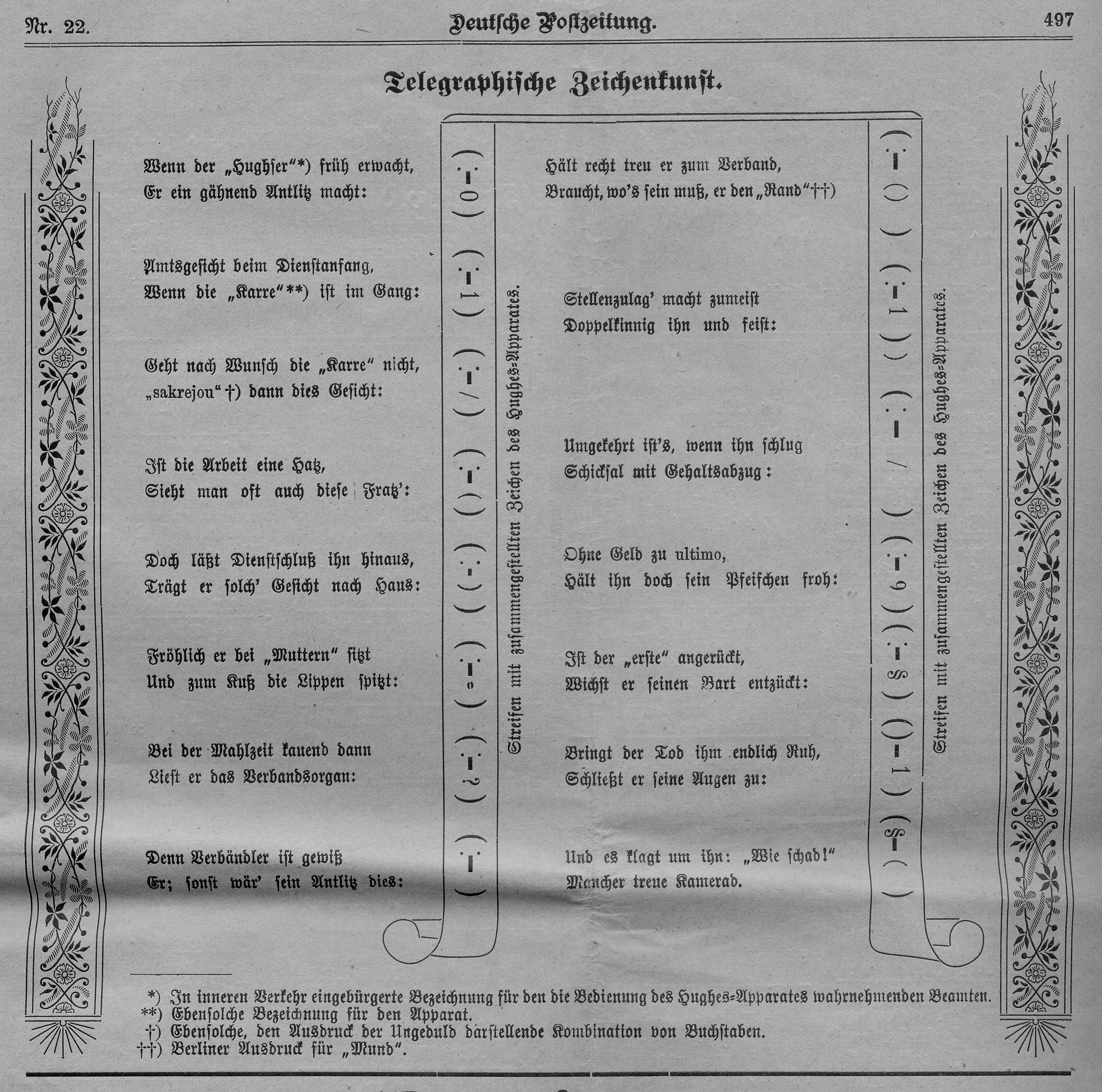 Emoticons aus dem analogen Zeitalter